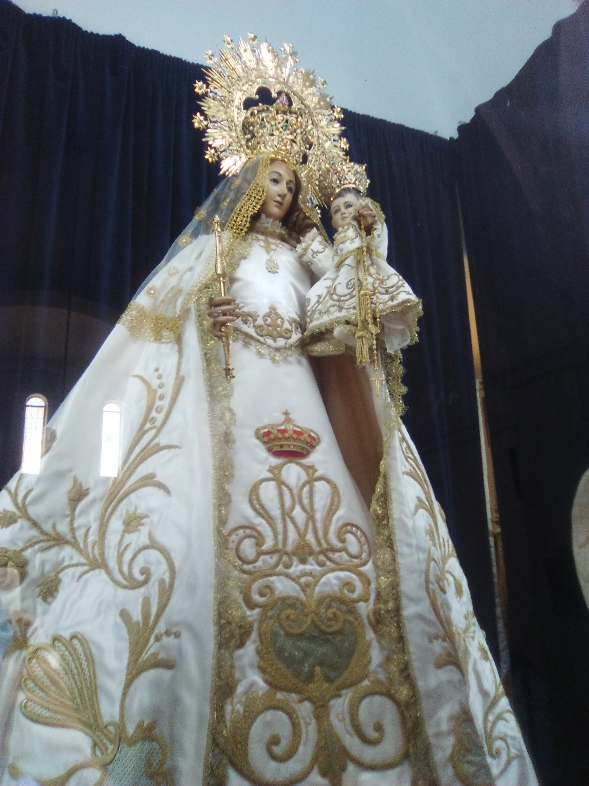 La patrona de Valencia de Alcántara en su camarín vistiendo el llamado "traje de la Hermandad".